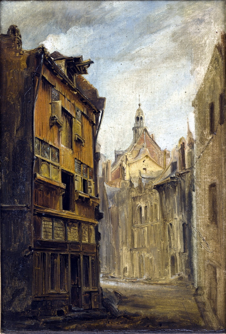 Olieverfschilderij door Alexander Schaepkens van een gesloopt huis aan de westzijde van de Kersenmarkt in Maastricht. Dit laatste houten huis in Maastricht werd in 1838 afgebroken. Formaat: 52 x 35 cm (excl. lijst). Collectie Bonnefantenmuseum Maastricht, objectnummer 1004856 (bruikleen 1922).